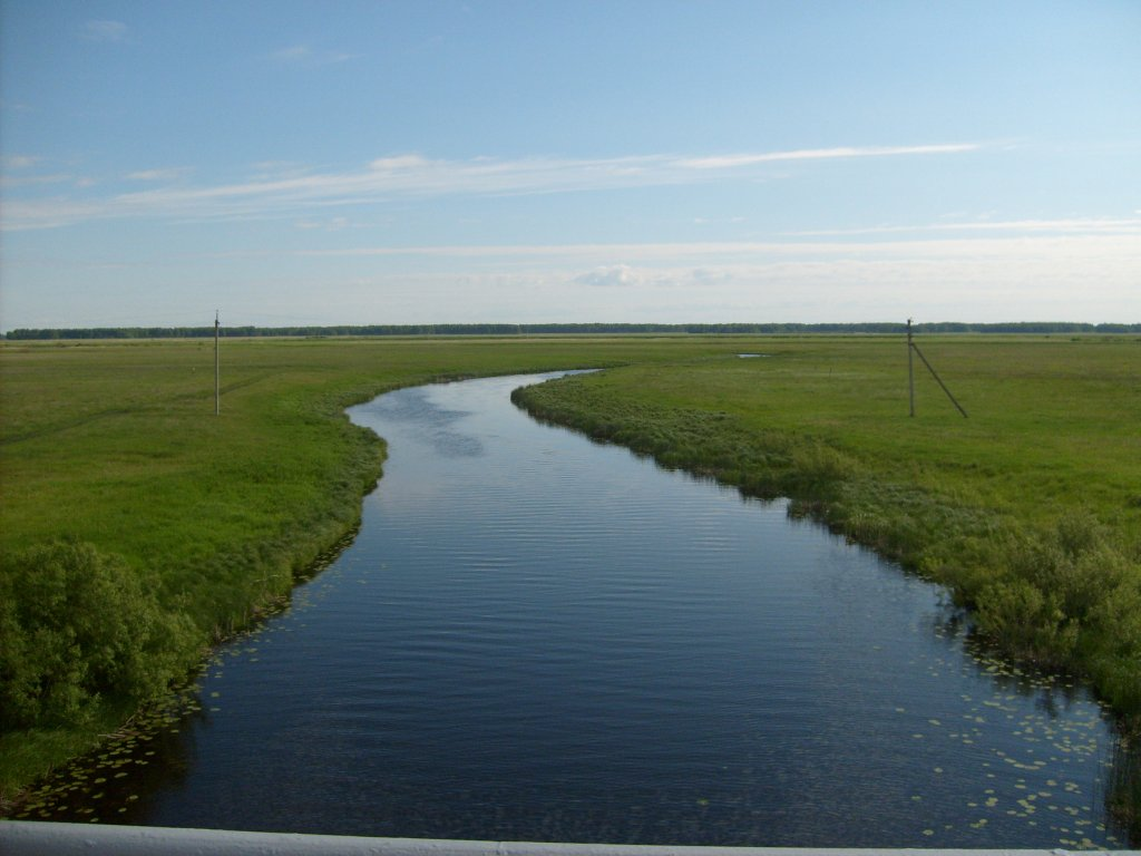 река Каргат (Новосибирская область), вид с моста федеральной трассы М51